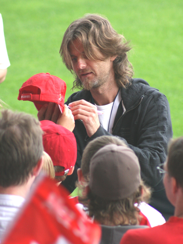 Alain Sutter im Trainingslager der Schweizer Fussballnationalmannschaft vor der Euro 2008